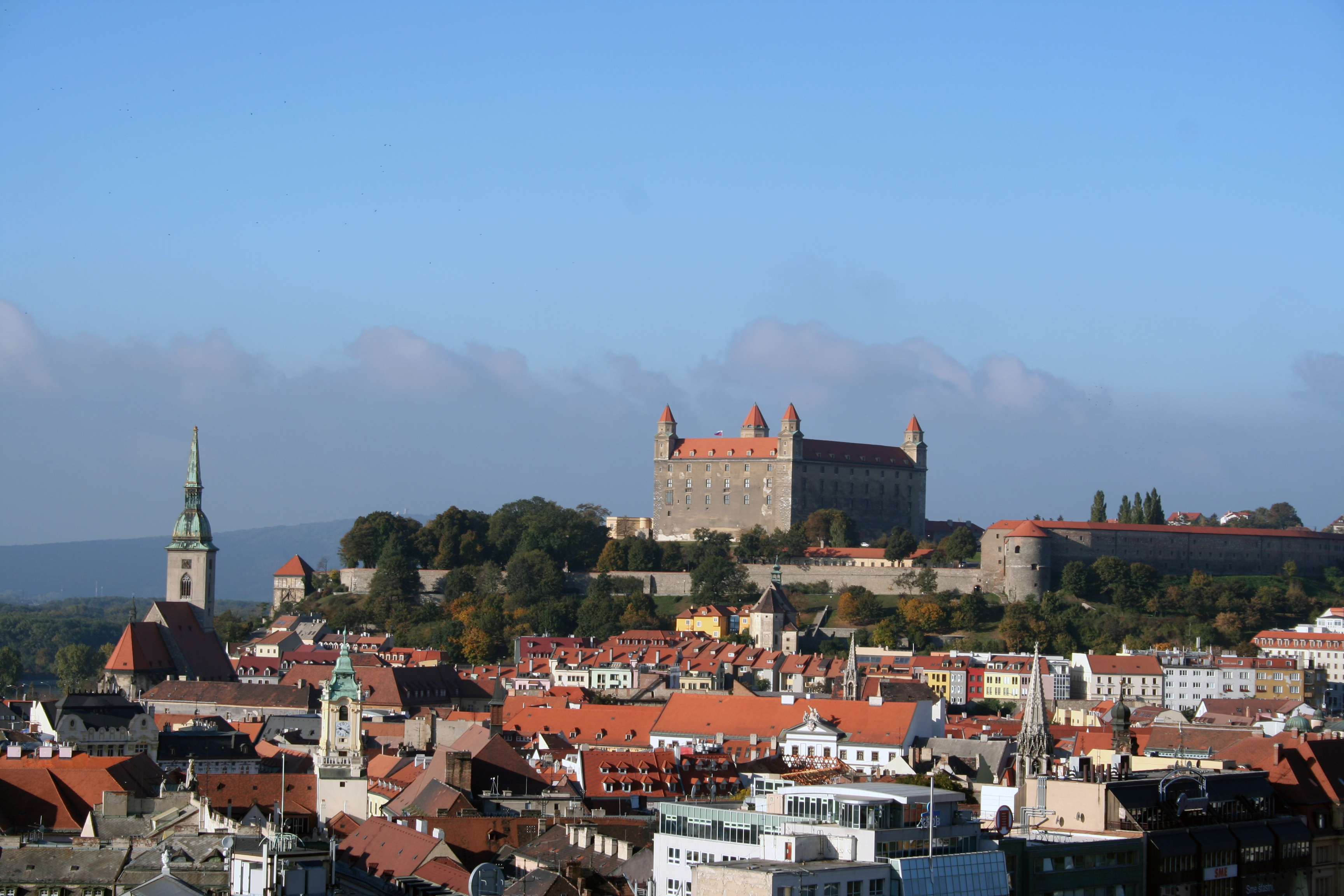 Bratislava Castle